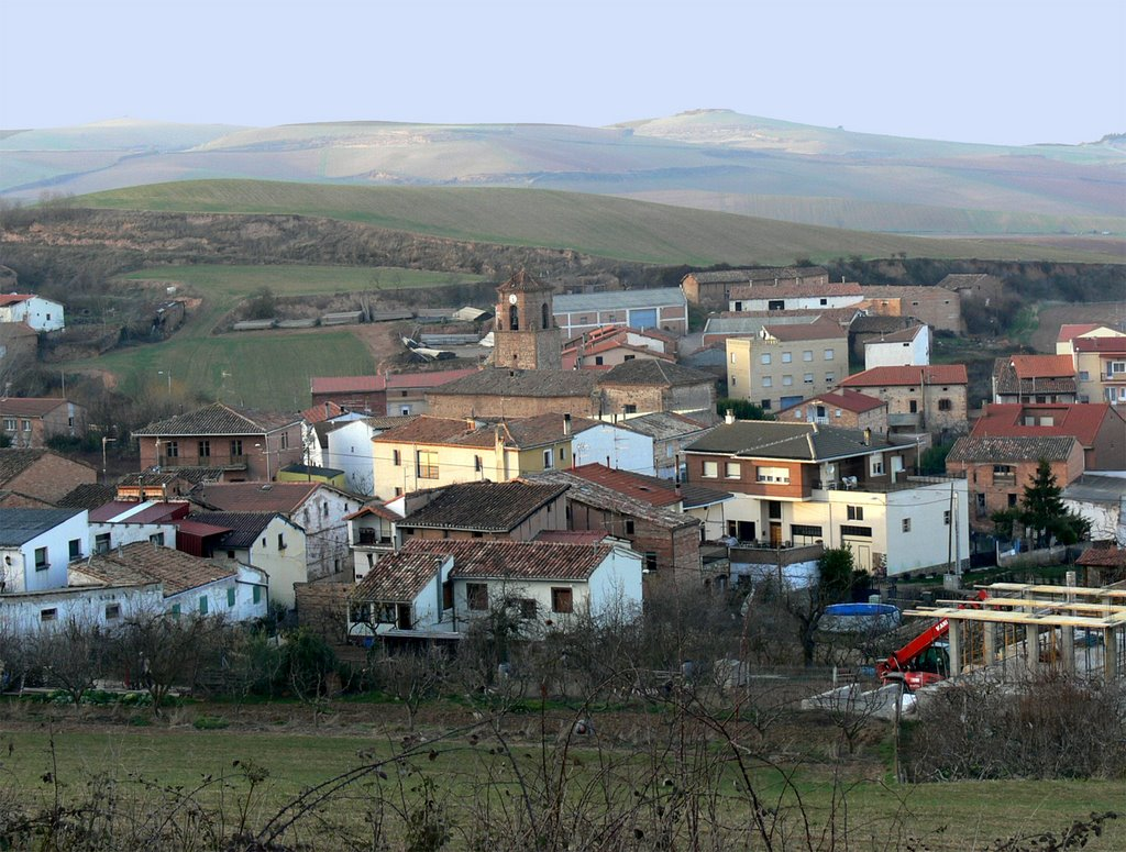 Villar de Torre, municipio de La Rioja (España).